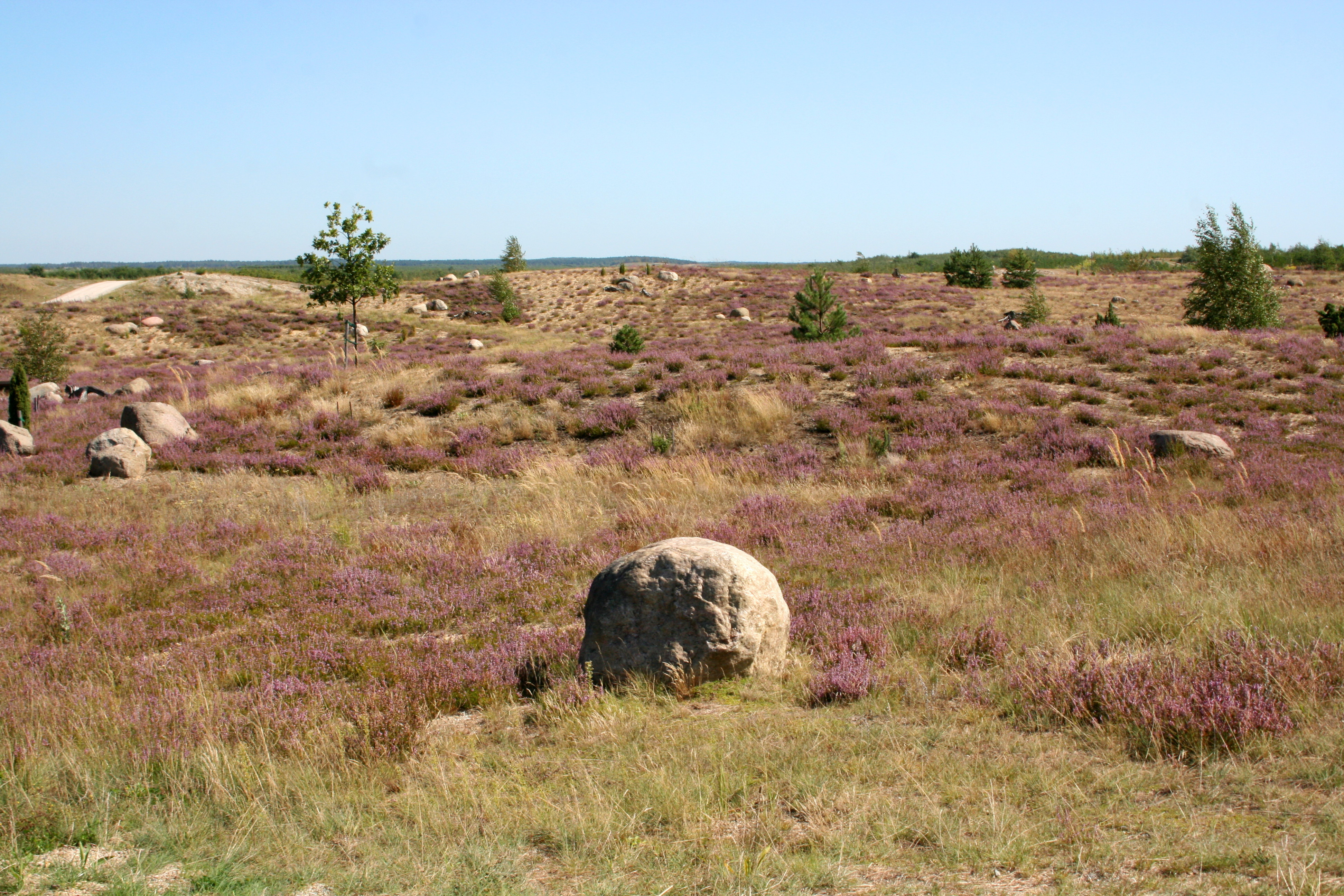 Findlingspark Nochten in Boxberg/O.L.-Nochten